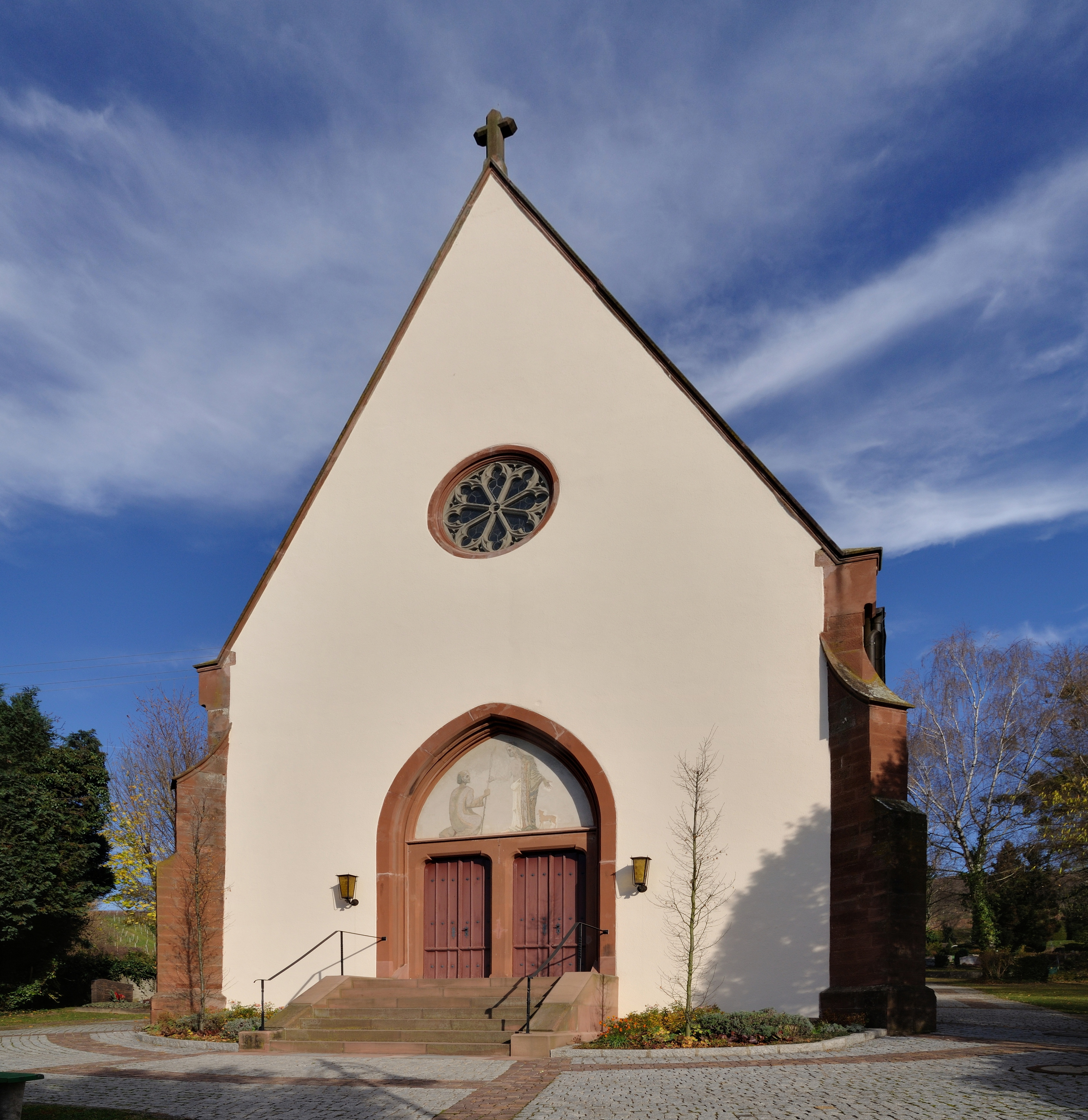 Weil am Rhein-Haltingen: St. Georg